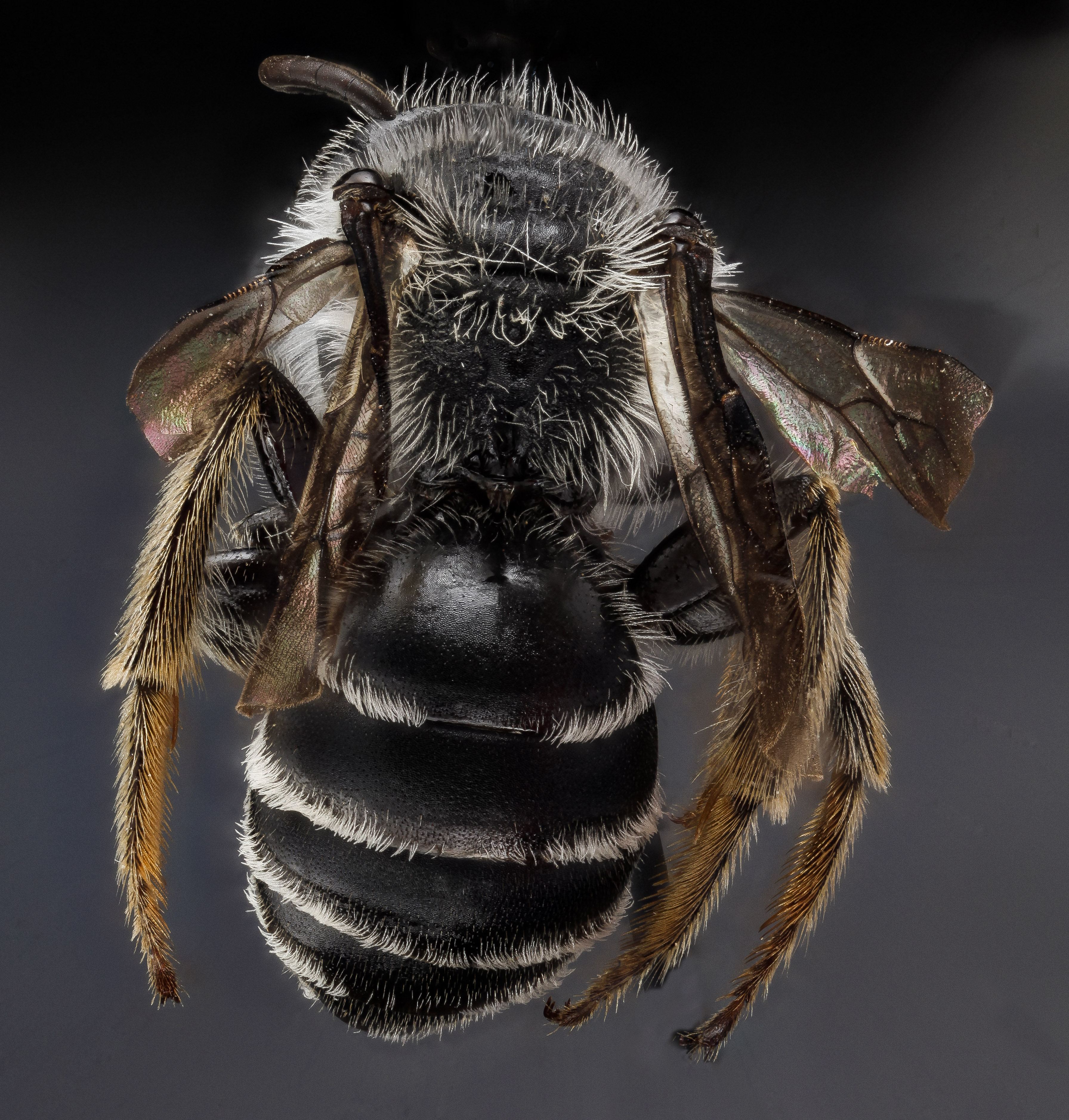 Andrena aliciae, male